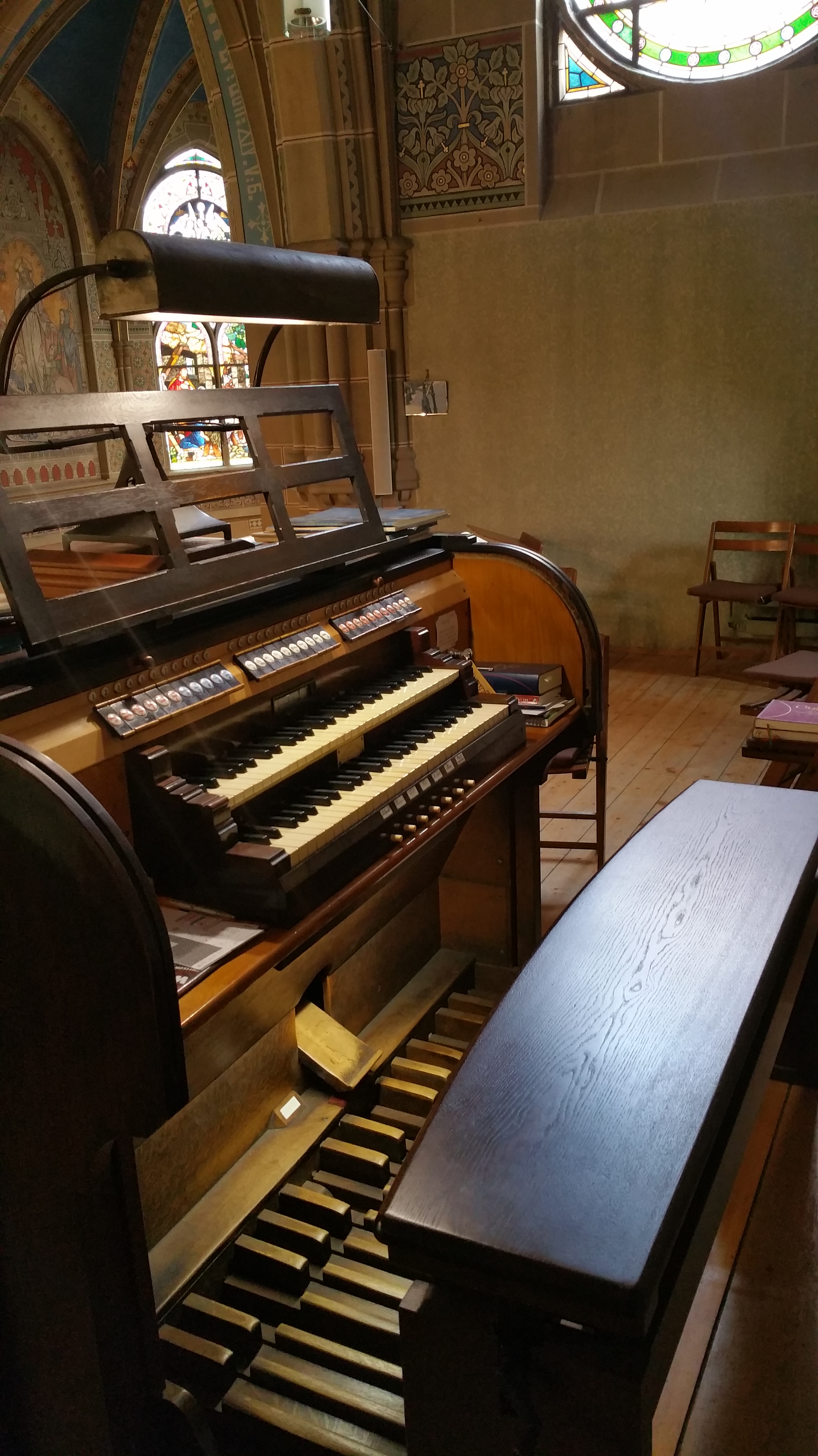 Dortmund Asseln ev Kirche, Spieltisch Hauptorgel